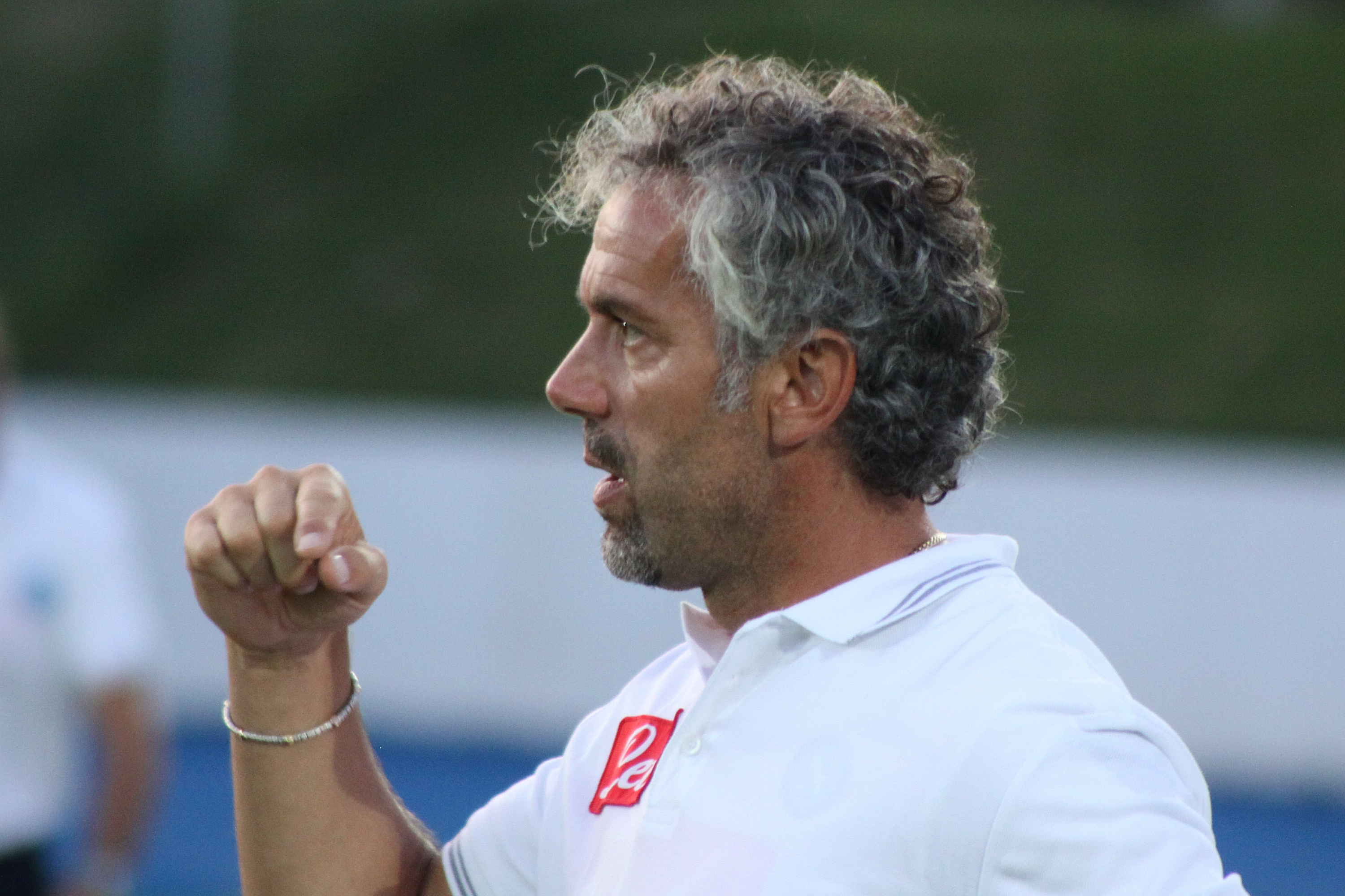 Trainer Roberto Donadoni - SSC Neapel (8) Allentatore Roberto Donadoni - Società Sportiva Calcio Napoli